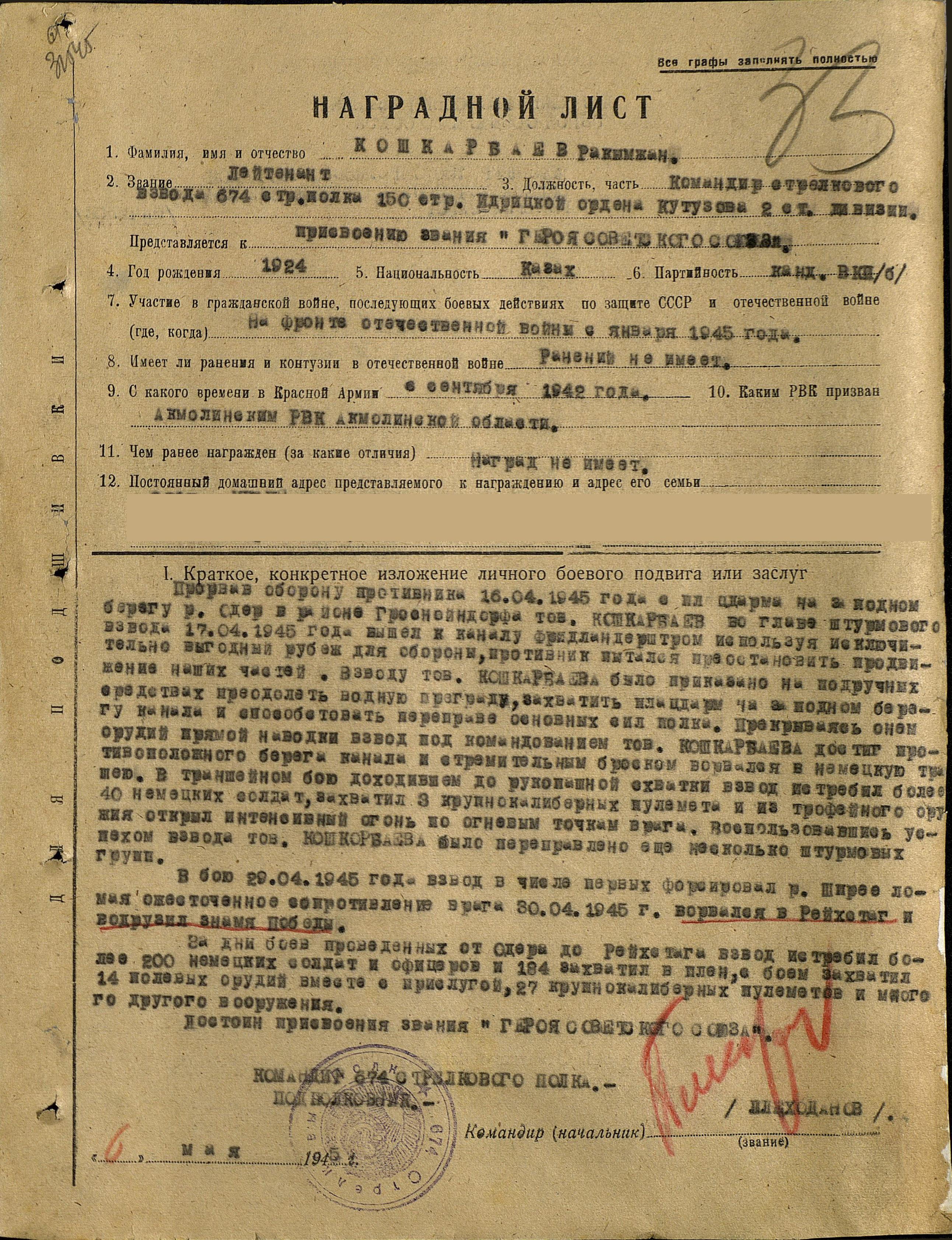 Наградной лист-представление Кошкарбаева Ракымжана к званию Героя Советского Союза